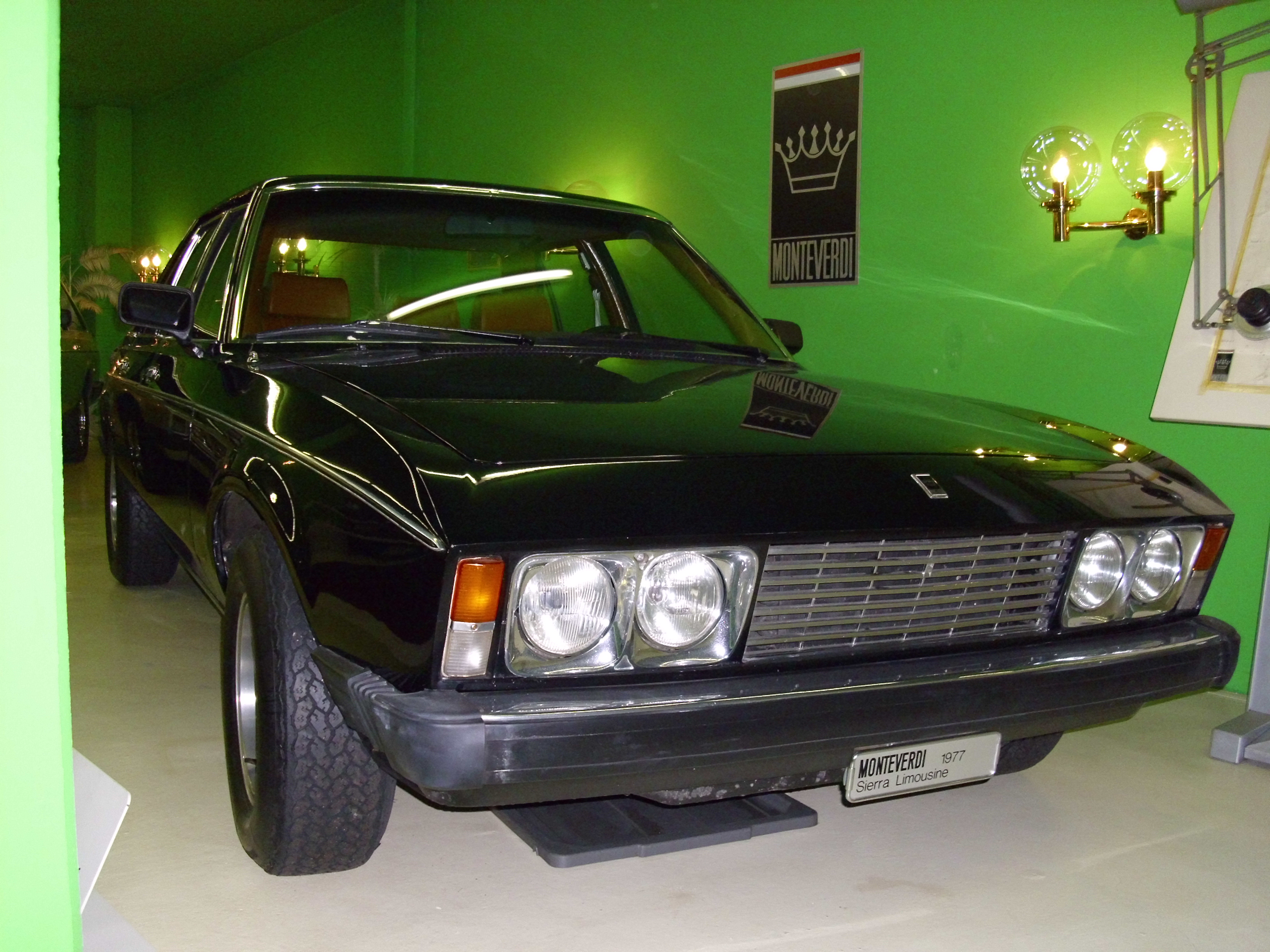 Monteverdi Sierra von 1977